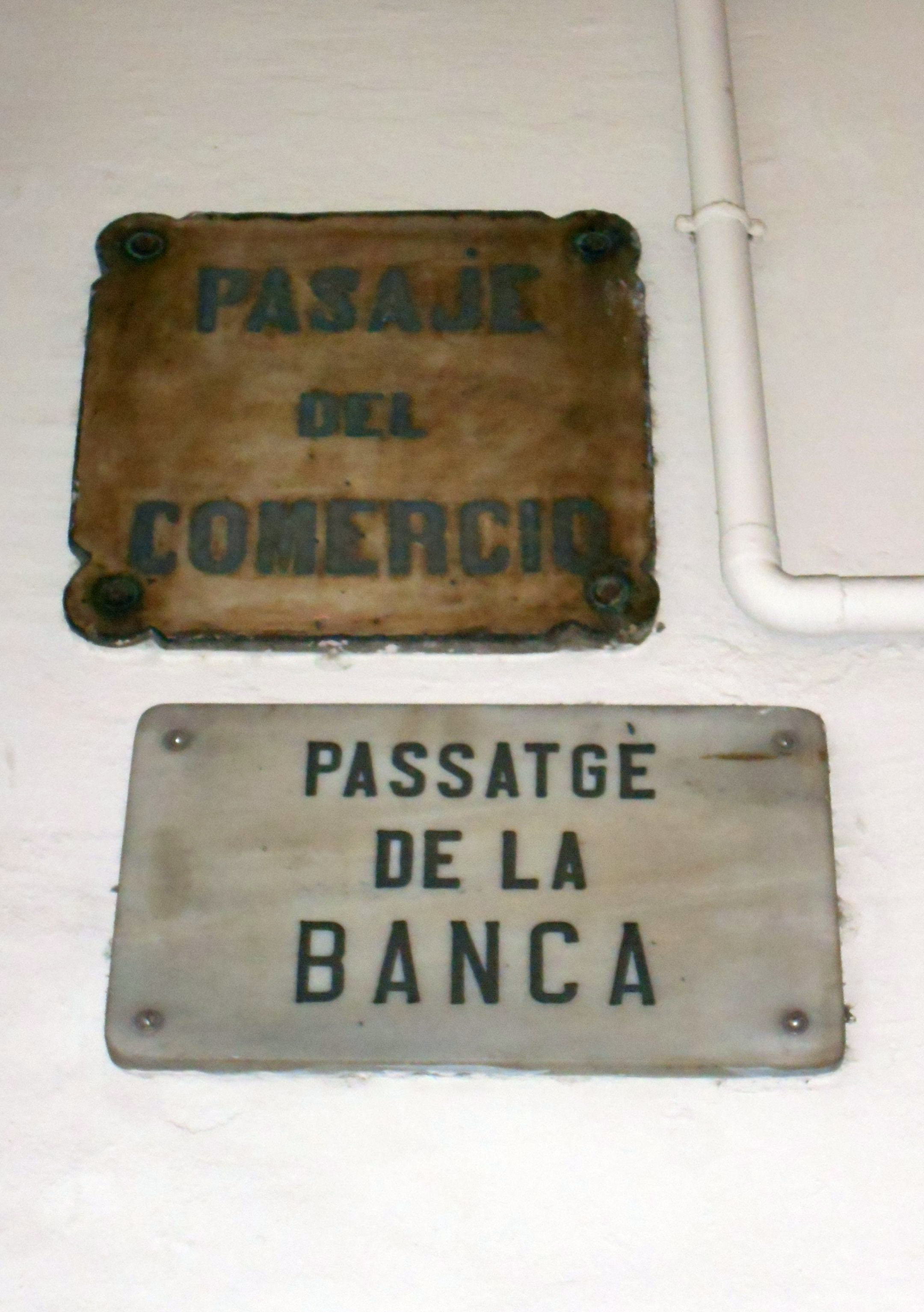 Pasaje de la Banca.